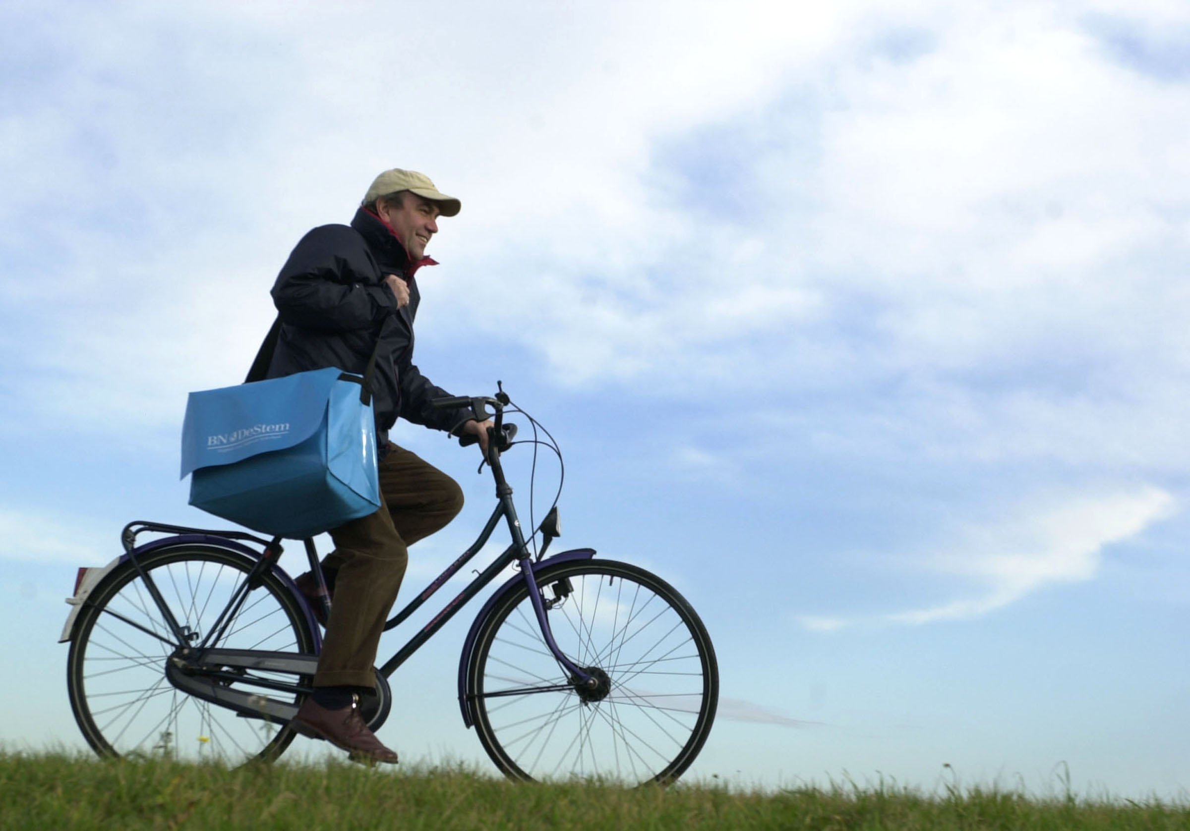 Hoofdredacteir Johan van Uffelen van BN DeStem als krantenbezorger.